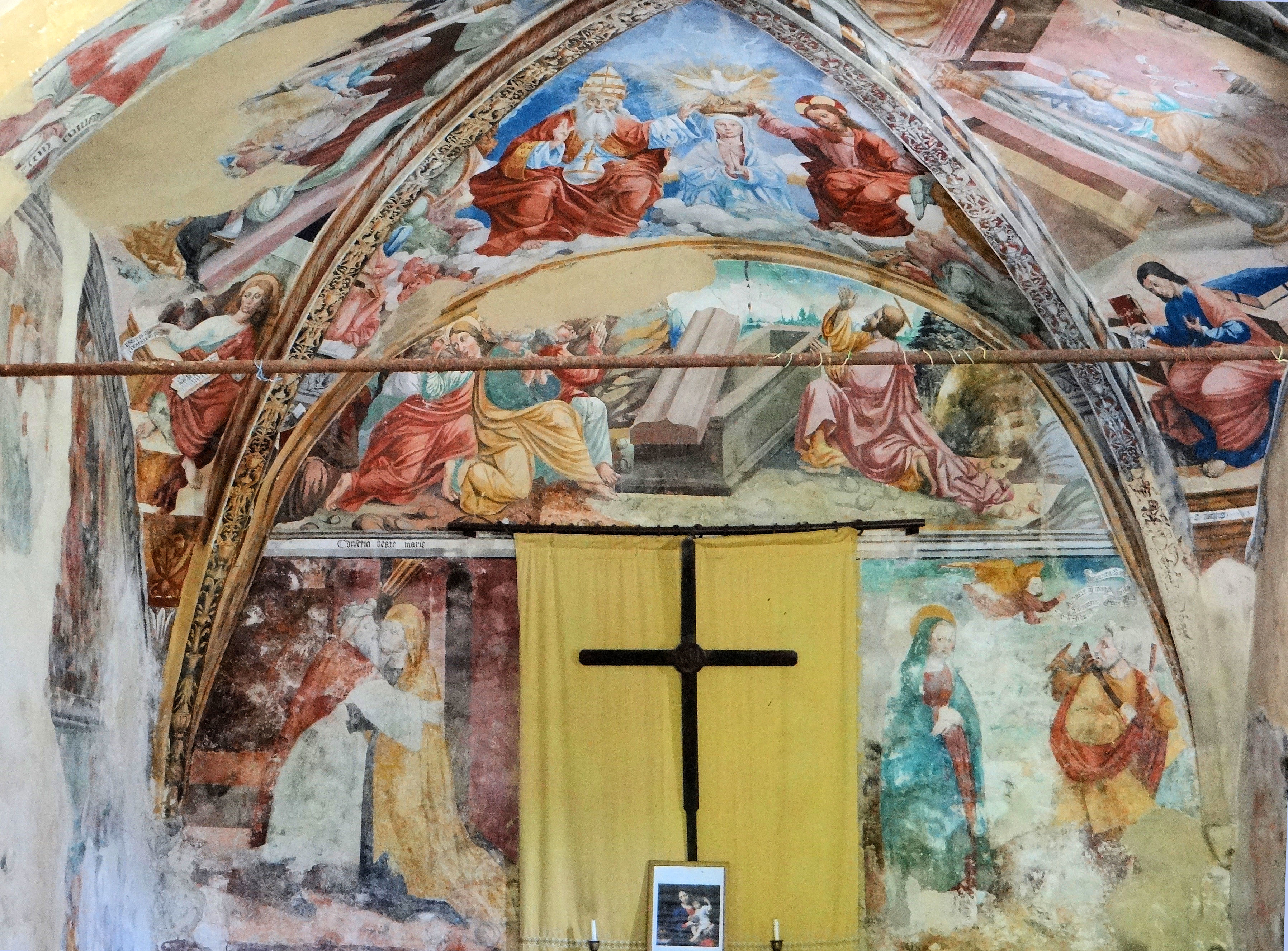 Sigale - Chapelle Notre-Dame-d'Entrevignes - Peintures murales du chevet